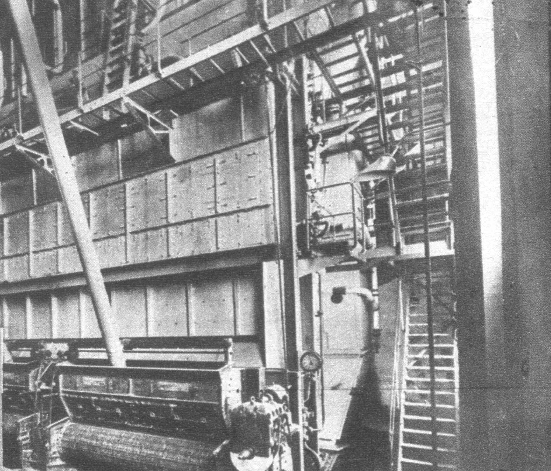 A Bánhidai Erőmű kazánházának egy részlete, a Ganz és Társa gyártotta kazánokkal felszerelve. Magyarország akkori legnagyobb kazántelepe nyolcezer négyzetméter fűtőfelülettel.